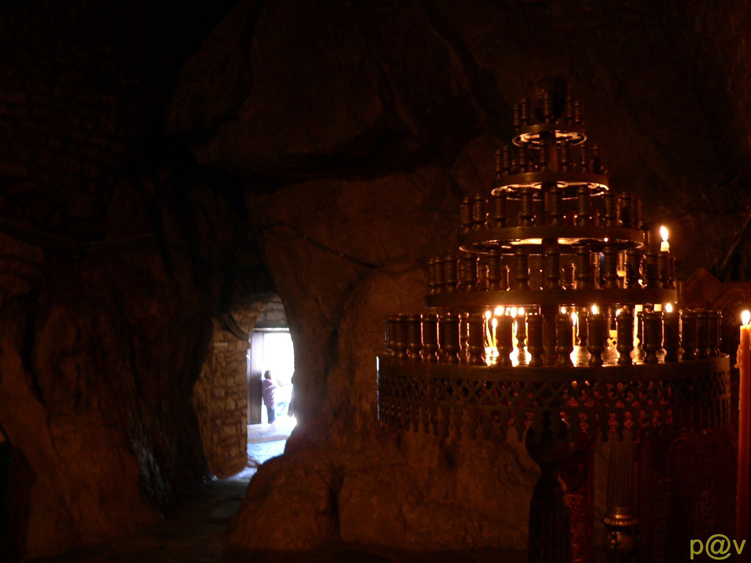 Παναγια Πελεκητη